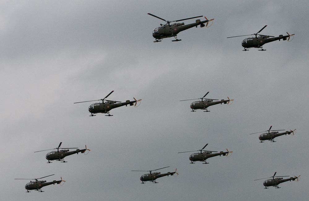 20100724-_DSC8462